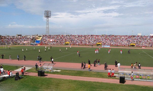 Estadio Elías Aguirre de la ciudad de Chiclayo, “Campeonato Descentralizado” (Aurich 2:0 Universitario), 12 de abril de 2009.